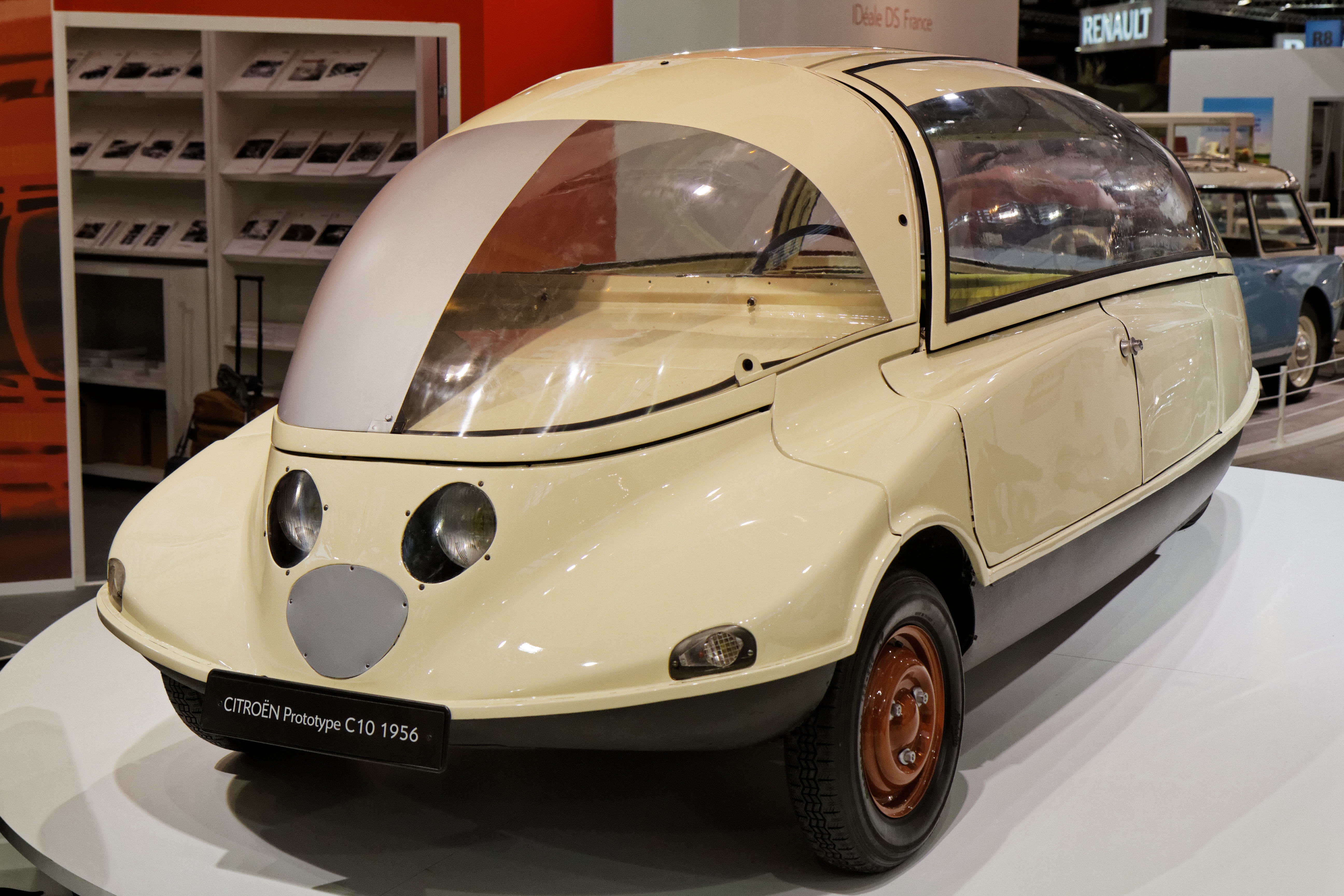 Une Citroën prototype C10 présentée lors du salon Retromobile 2014.